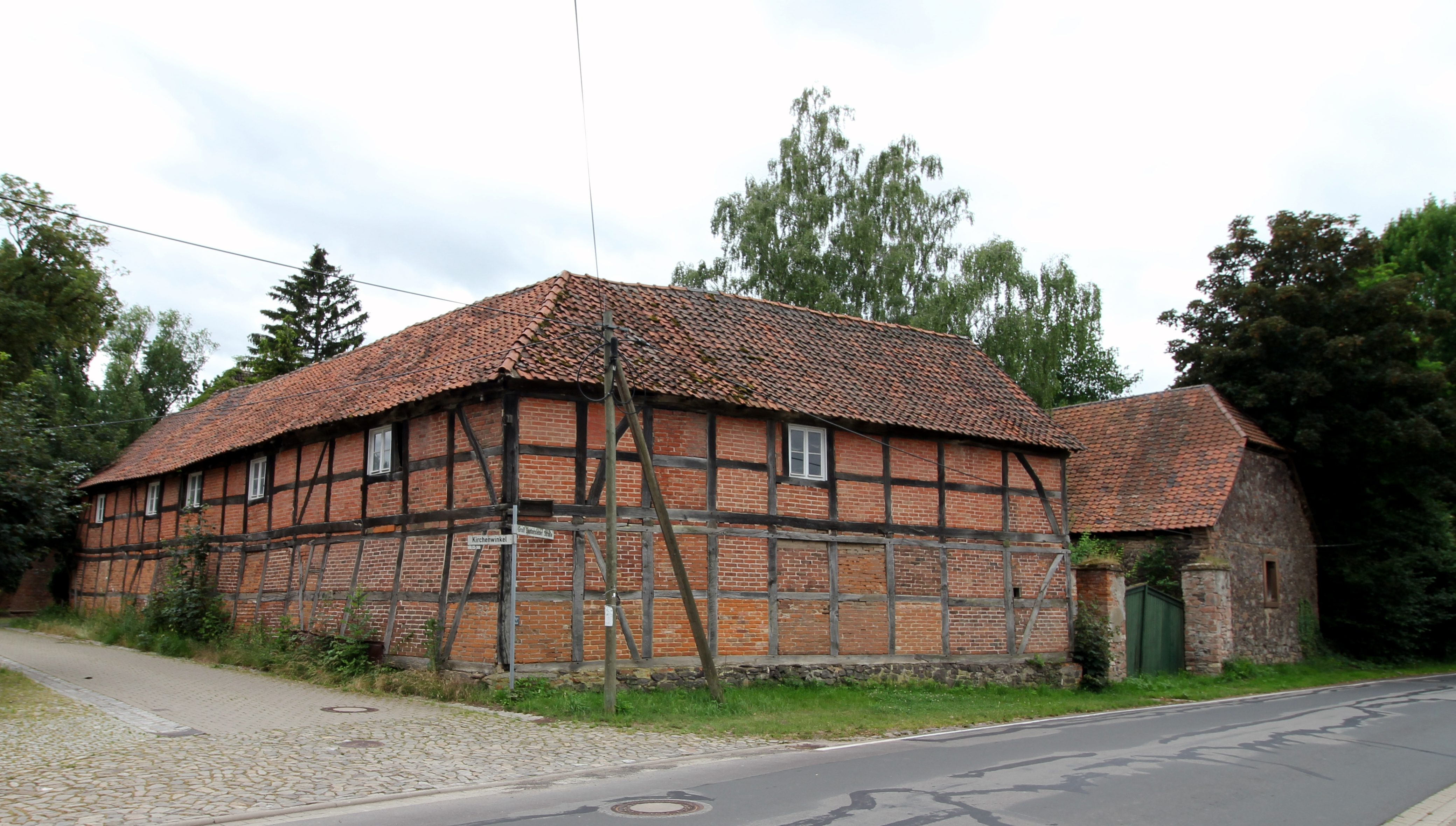 Häusergruppe Groß Santersleber Straße 10 Ecke Kirchwinkel Schackensleben